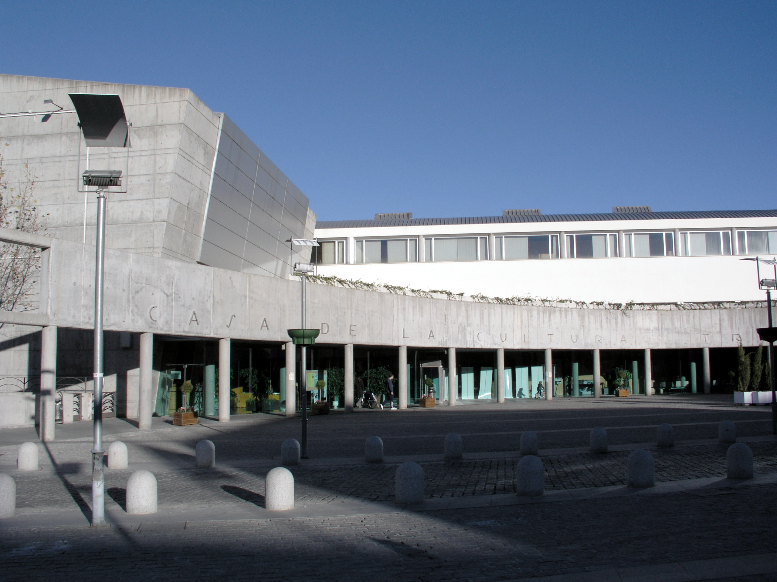 Tres Cantos, Madrid, Spain. Casa de la Cultura.